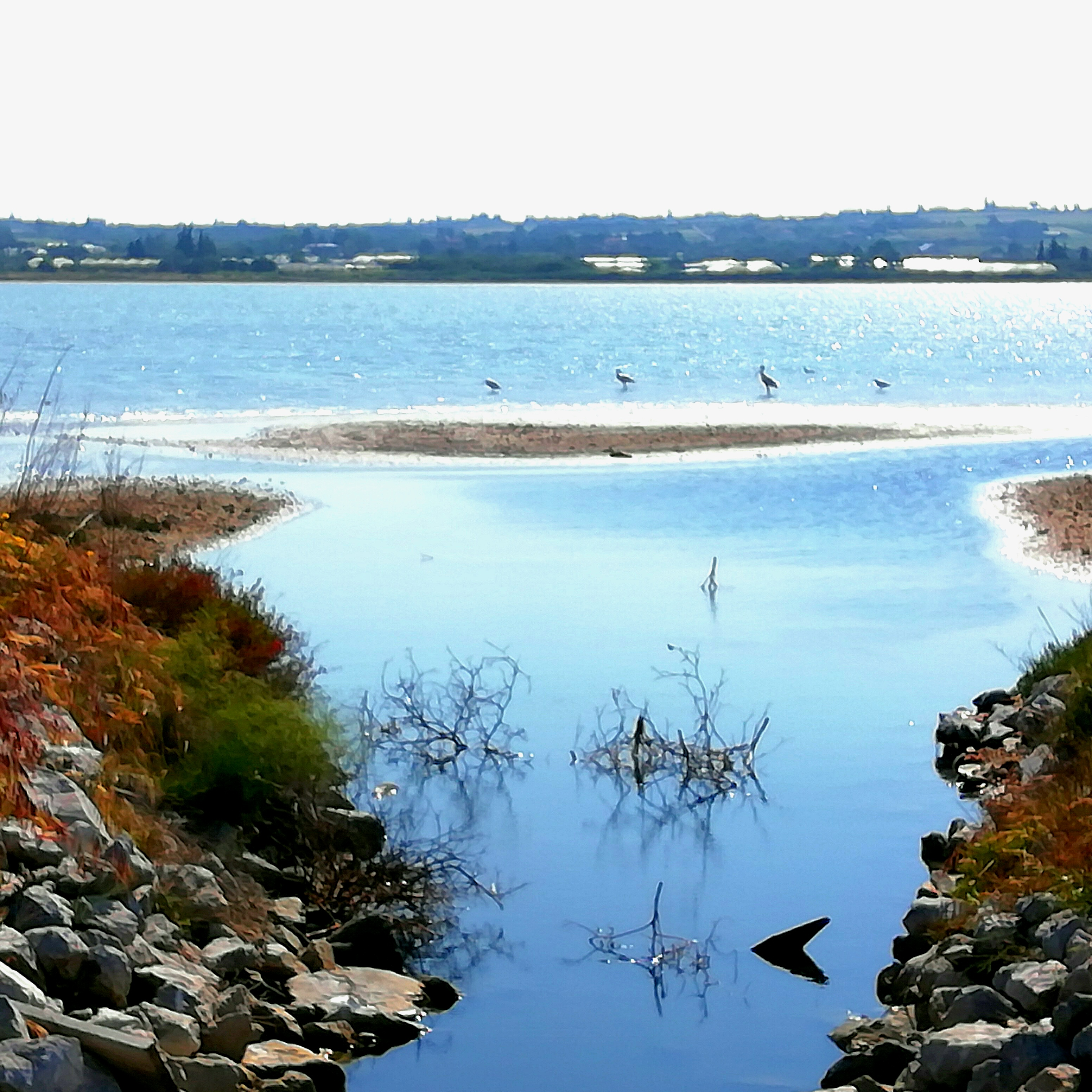 Υδροβιότοπος Αγγελοχωρίου Θεσσαλονίκης. Προστατευόμενη ζώνη This is a photography of Natura 2000 protected area with ID GR1220005